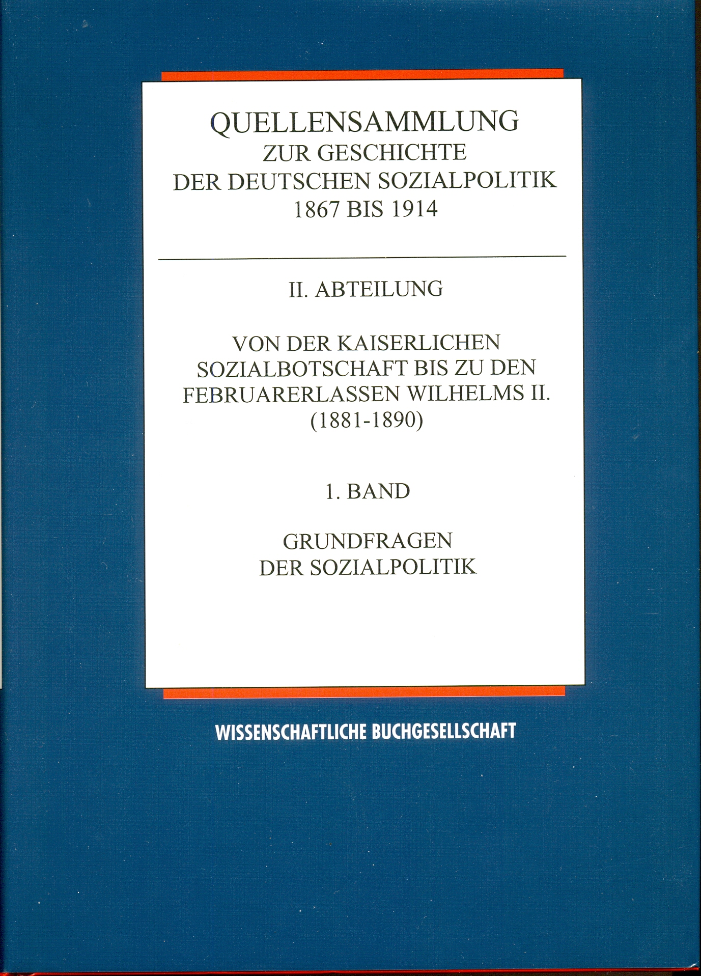 Titelbild Band 1 der II. Abteilung der "Quellensammlung zur Geschichte der deutschen Sozialpolitik 1867 bis 1914"